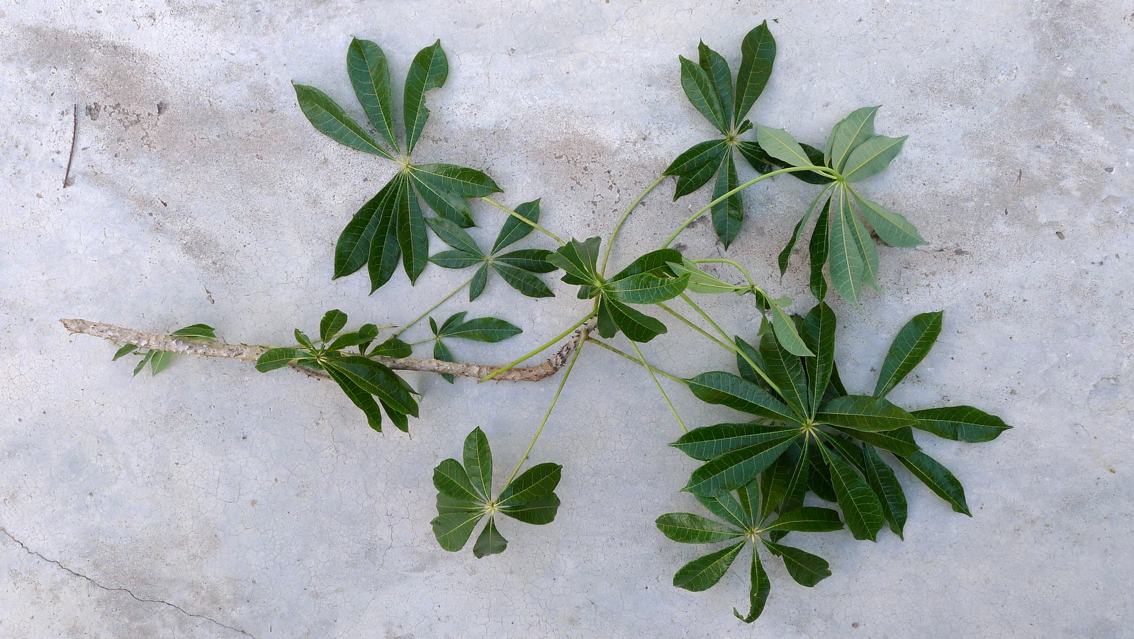 Jacaratia spinosa (Aubl.) A.DC.